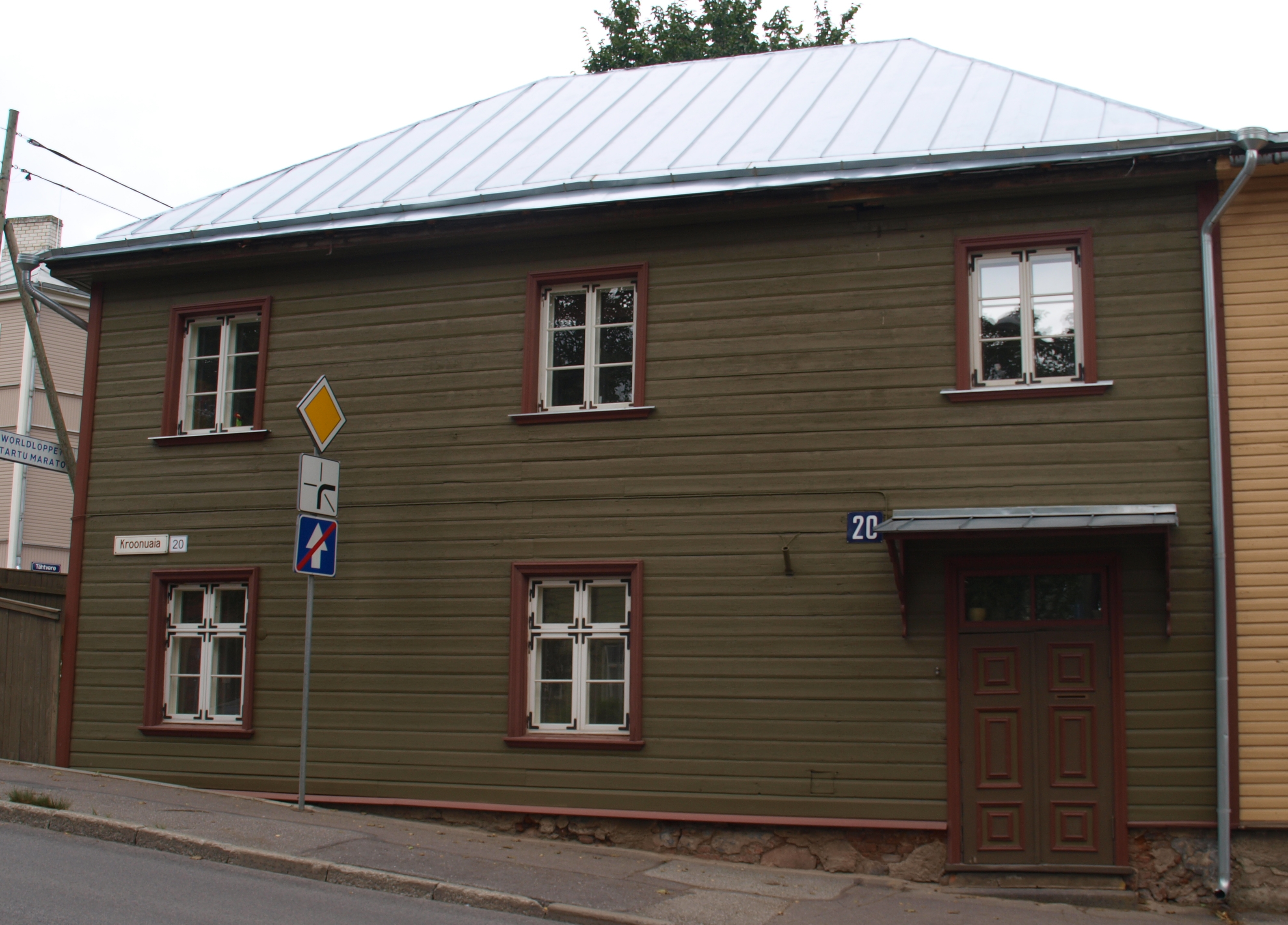 Puitelamu Tartus Kroonuaia 20, 18-19.saj.